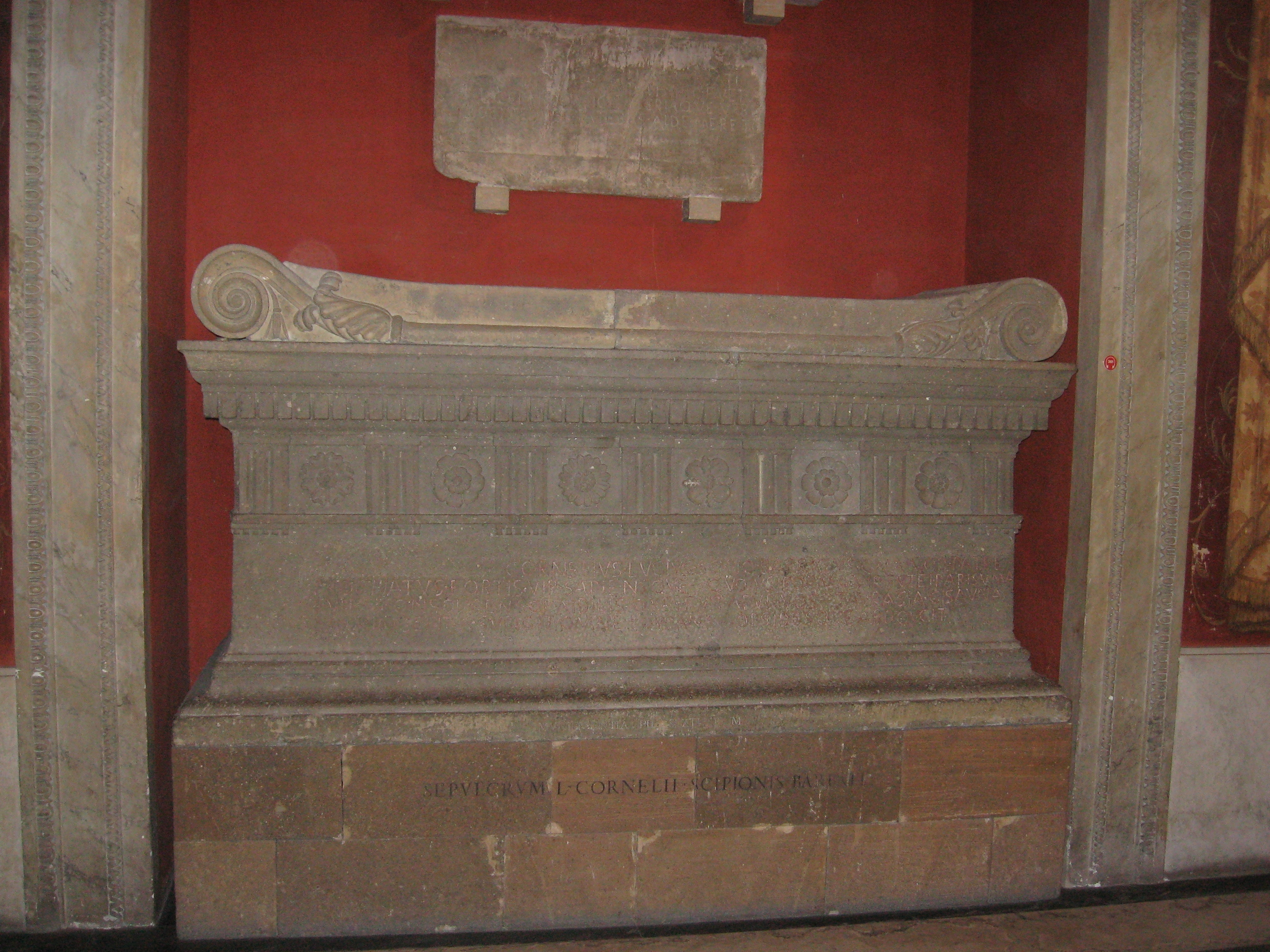 Sarkophag von Lucius Cornelius Scipio Barbatus, Museo Pio-Clementio im Vatikan, Vestibolo Quadrato (Raum 13) - Detail.